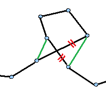 Skizze zum 2Opt-Verfahren: Entfernung von Überkreuzungen